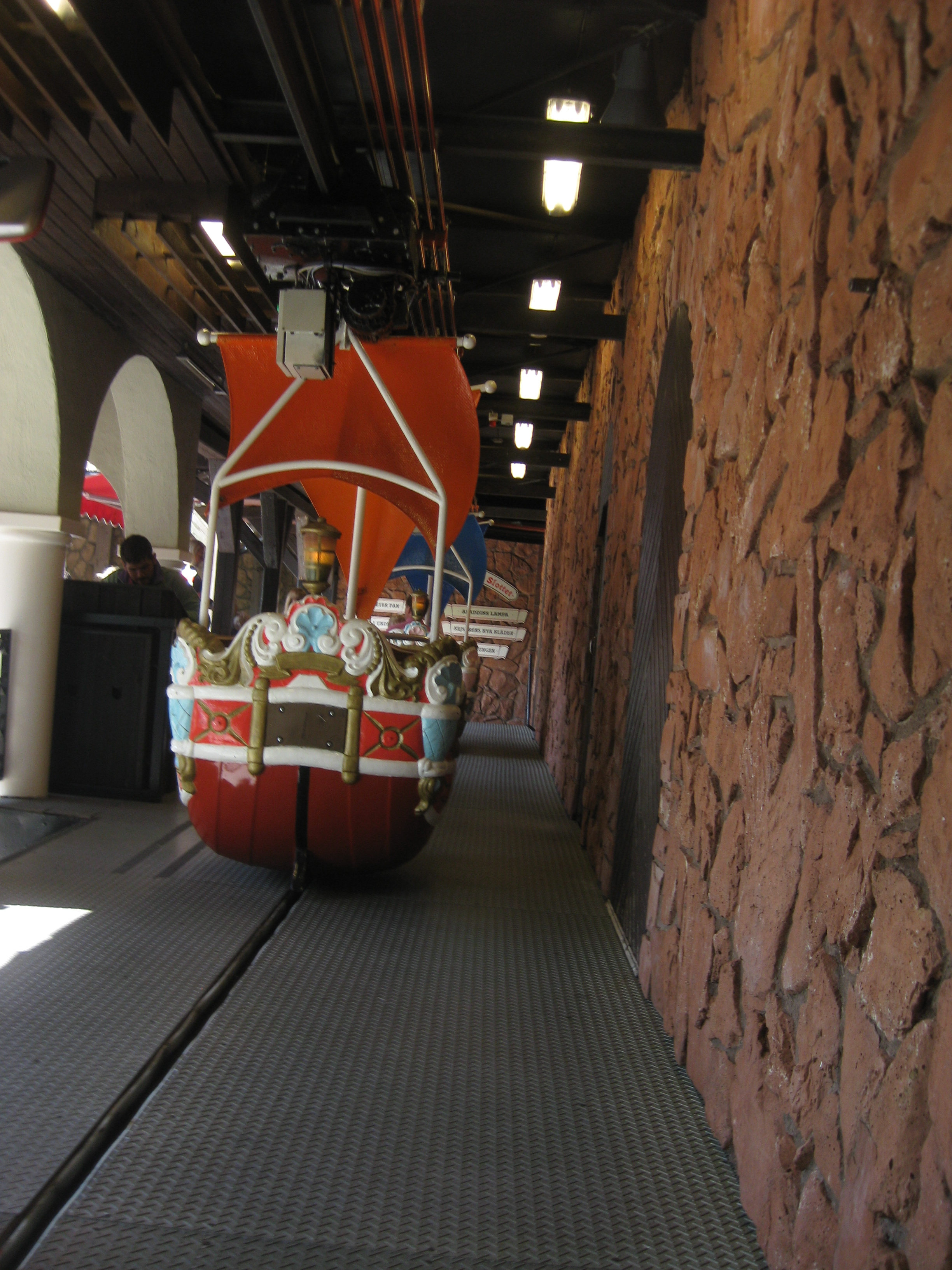 En av båtarna på Sagoslottet, Liseberg.